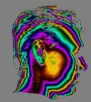 Falschfarbenbild nach dem 3D-Scan. Hier sind bereits 3D-Informationen im Bild enthalten.